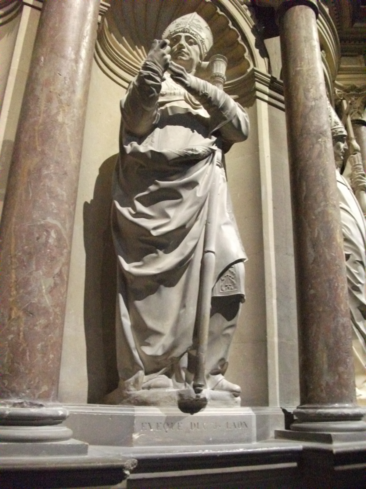 tombeau de Saint Rémi, statue du XVIIIe siècle représentant l'évêque et duc de Laon, quatrième figure méridionale.